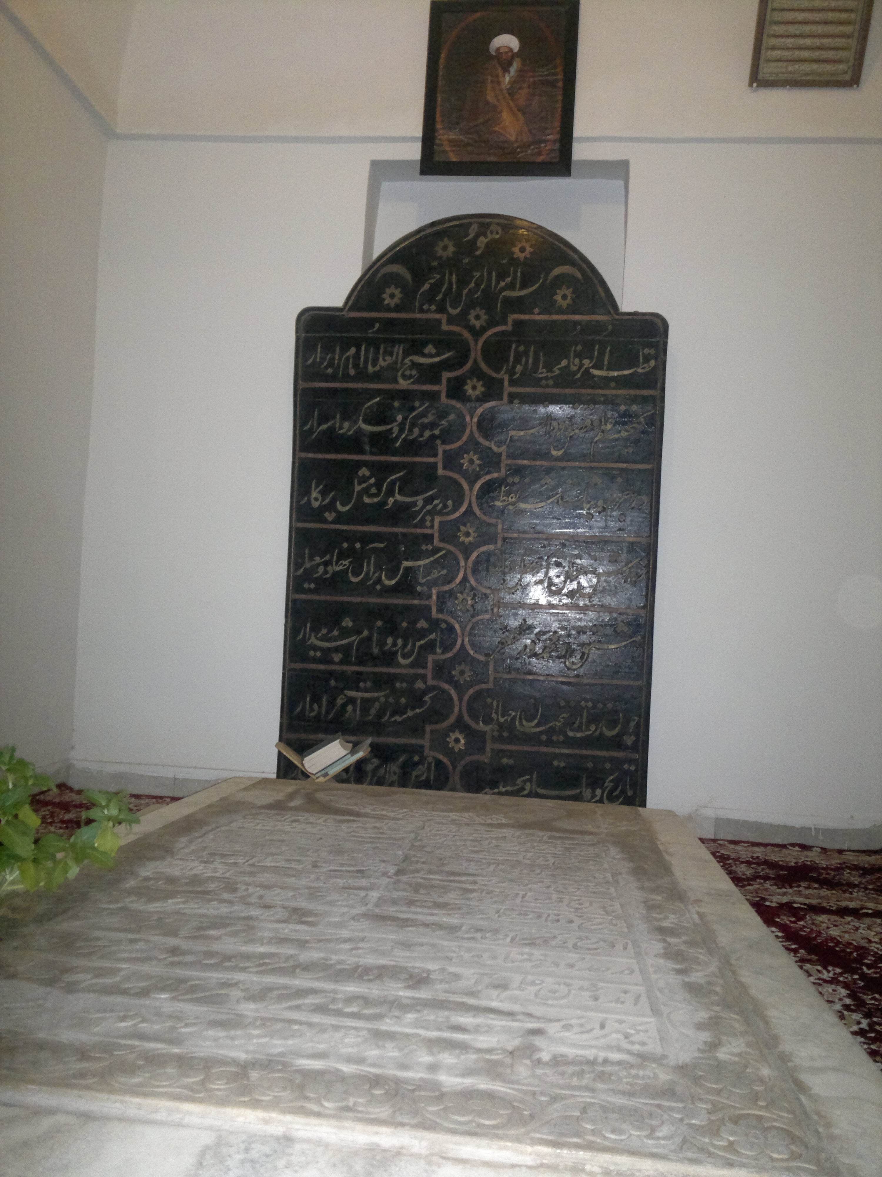 ملا محمد جعفر کرمانی پدر شیخ احمد روحی است و در امر جنبش مشروطه فعال بوده است شخصا این تصاویر را در مهر ماه 1393 گرفته ام.